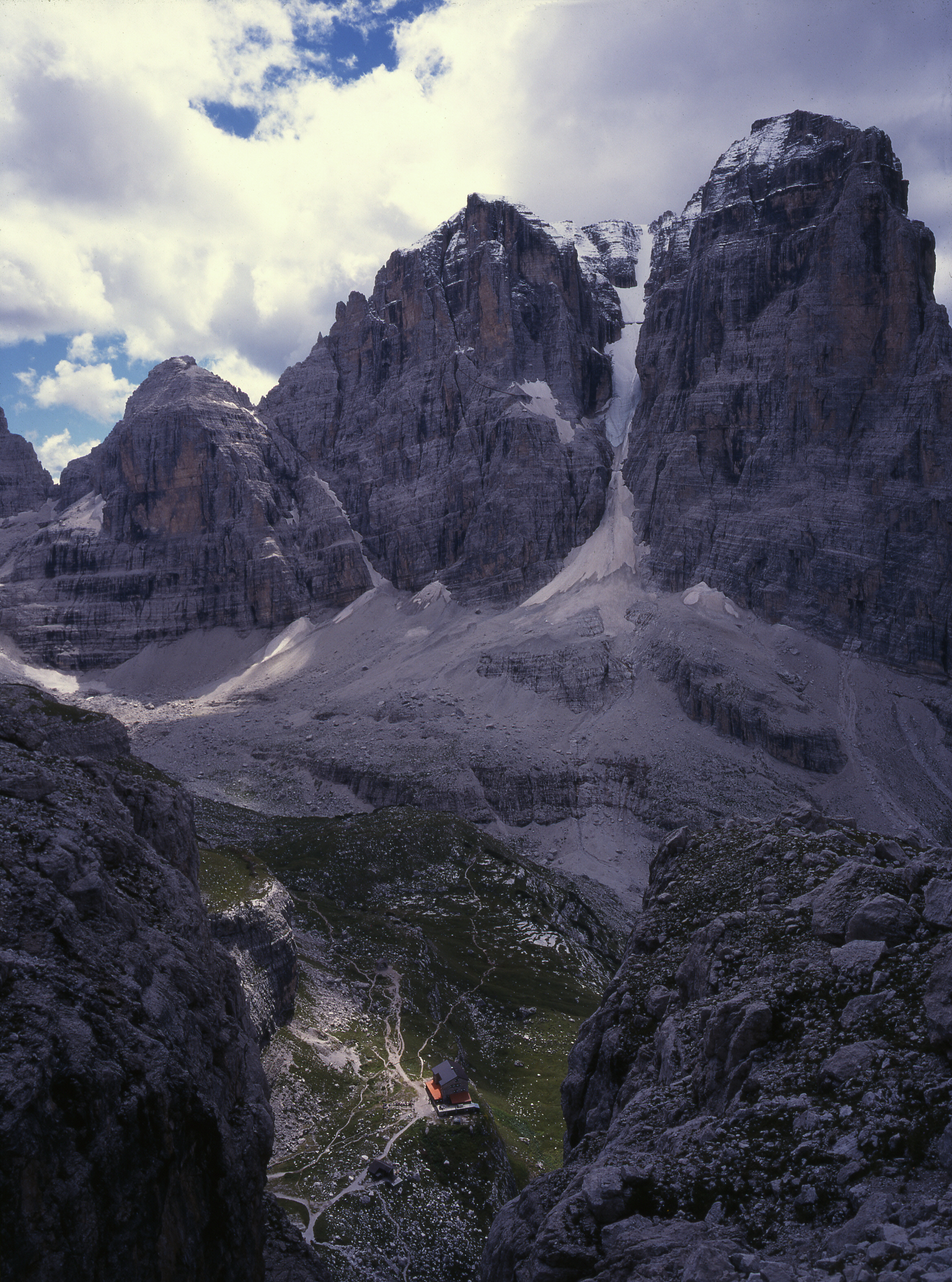 Italien, Brenta, Brentei-Hütte mit Crozzon di Brenta und der Cima-Tosa-Eisrinne